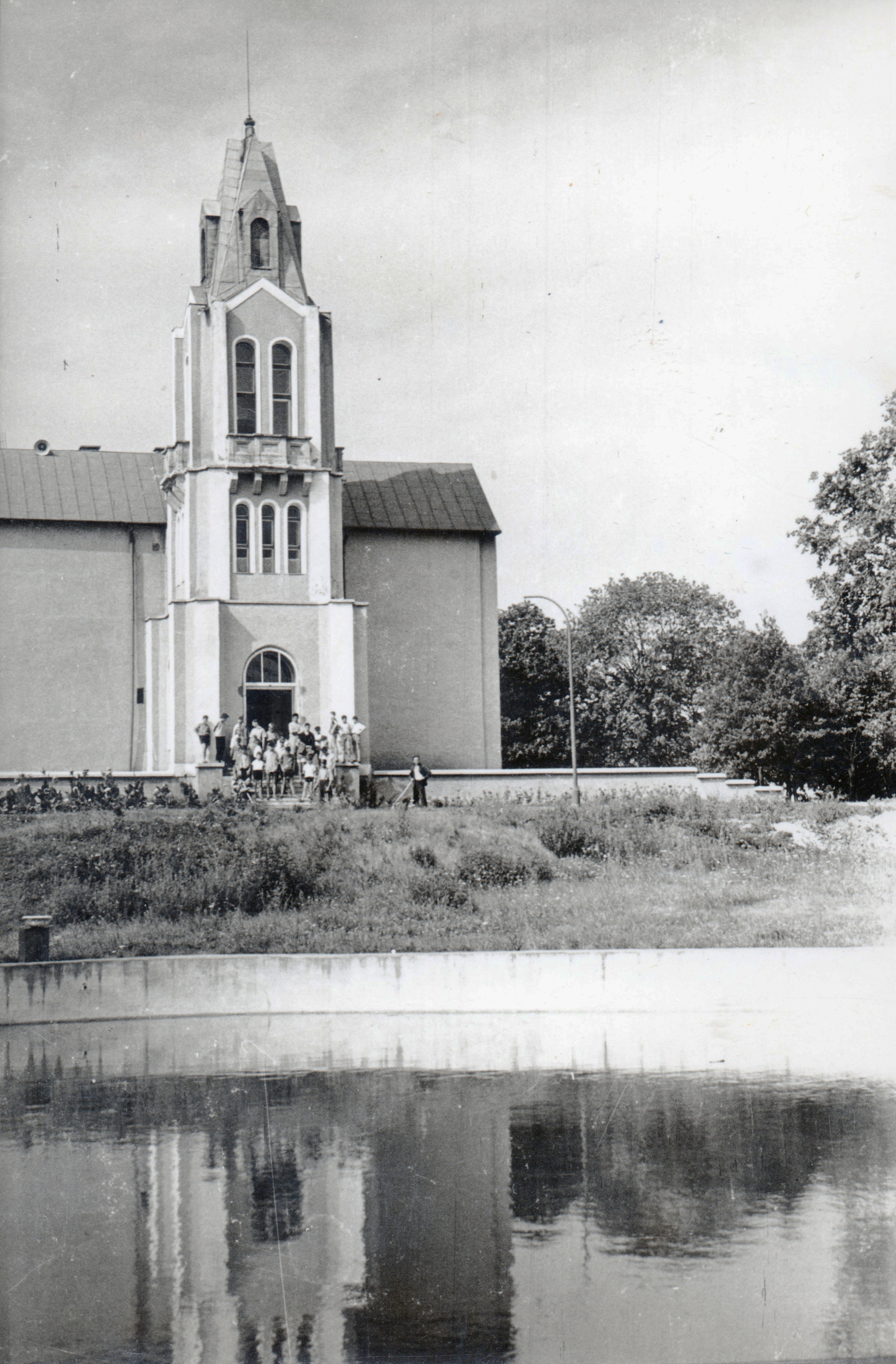 Lónyay kastély. Location: Hungary, Bodrogolaszi Title: Lónyay kastély.